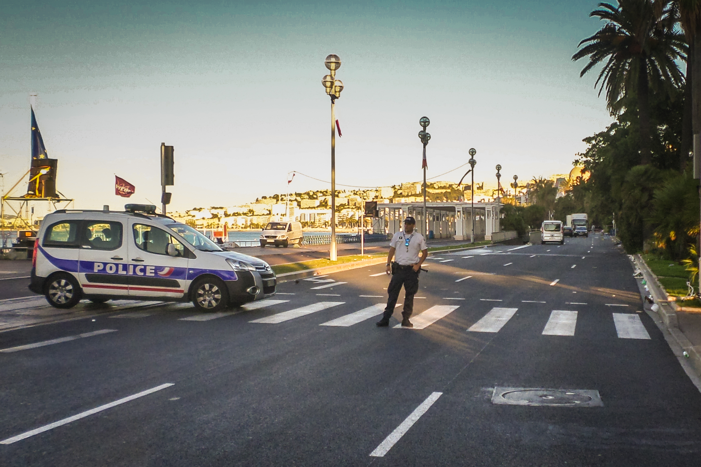 Le semi-remorque arrêté sur la Promenade des Anglais (Nice) le 15 juillet 2016 vers 07:00 heure, après l'attentat qui a fait plus de 84 morts la veille au soir.